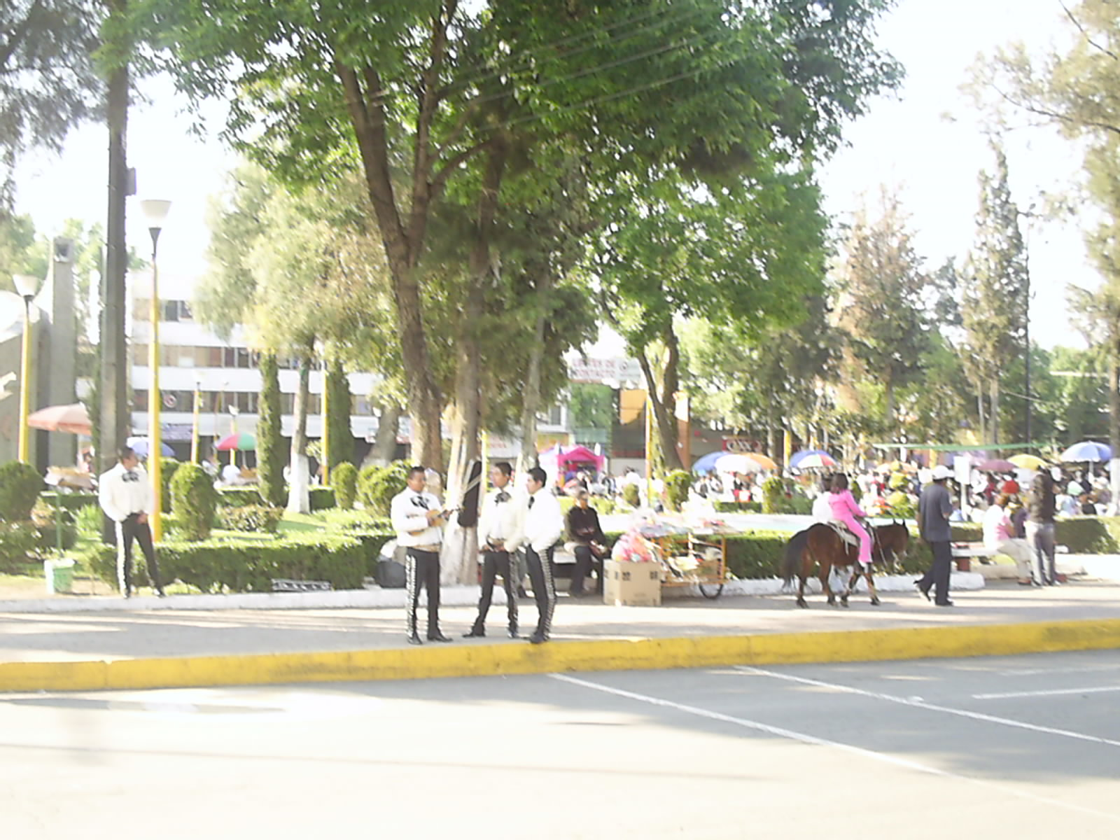 Mariachis en Ecatepec México